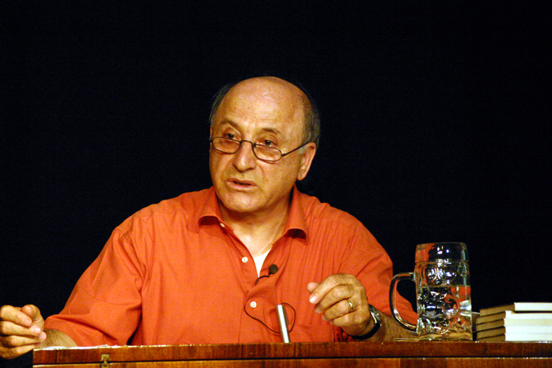 Haydar Işik, freier Schriftsteller, geboren 01.09.1937 in Tunceli, Aufgenommen während einer Lesung im Fraunhofer-Theater München.